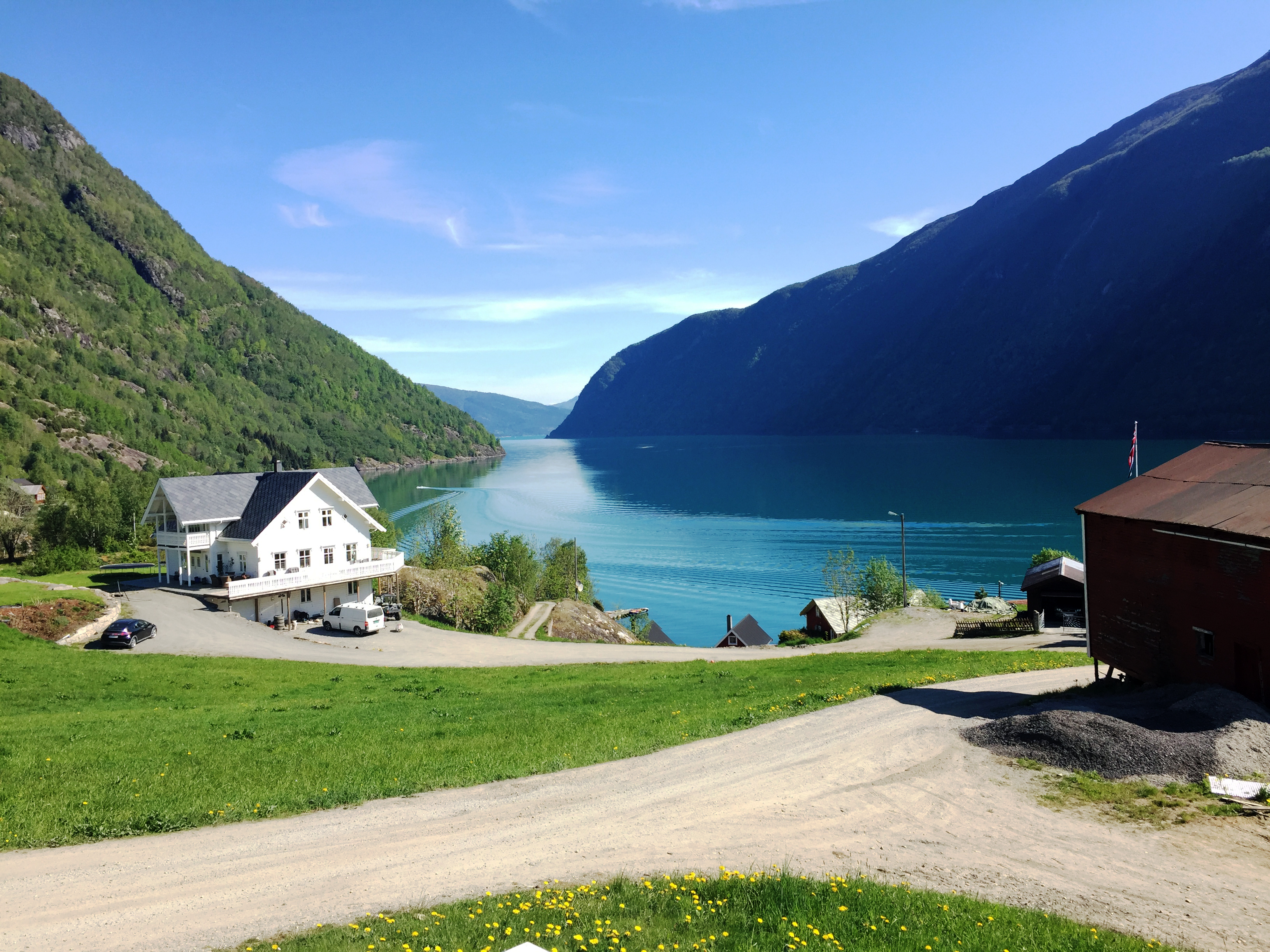 Arnafjorden sett frå Nese og ut mot Sognefjorden.